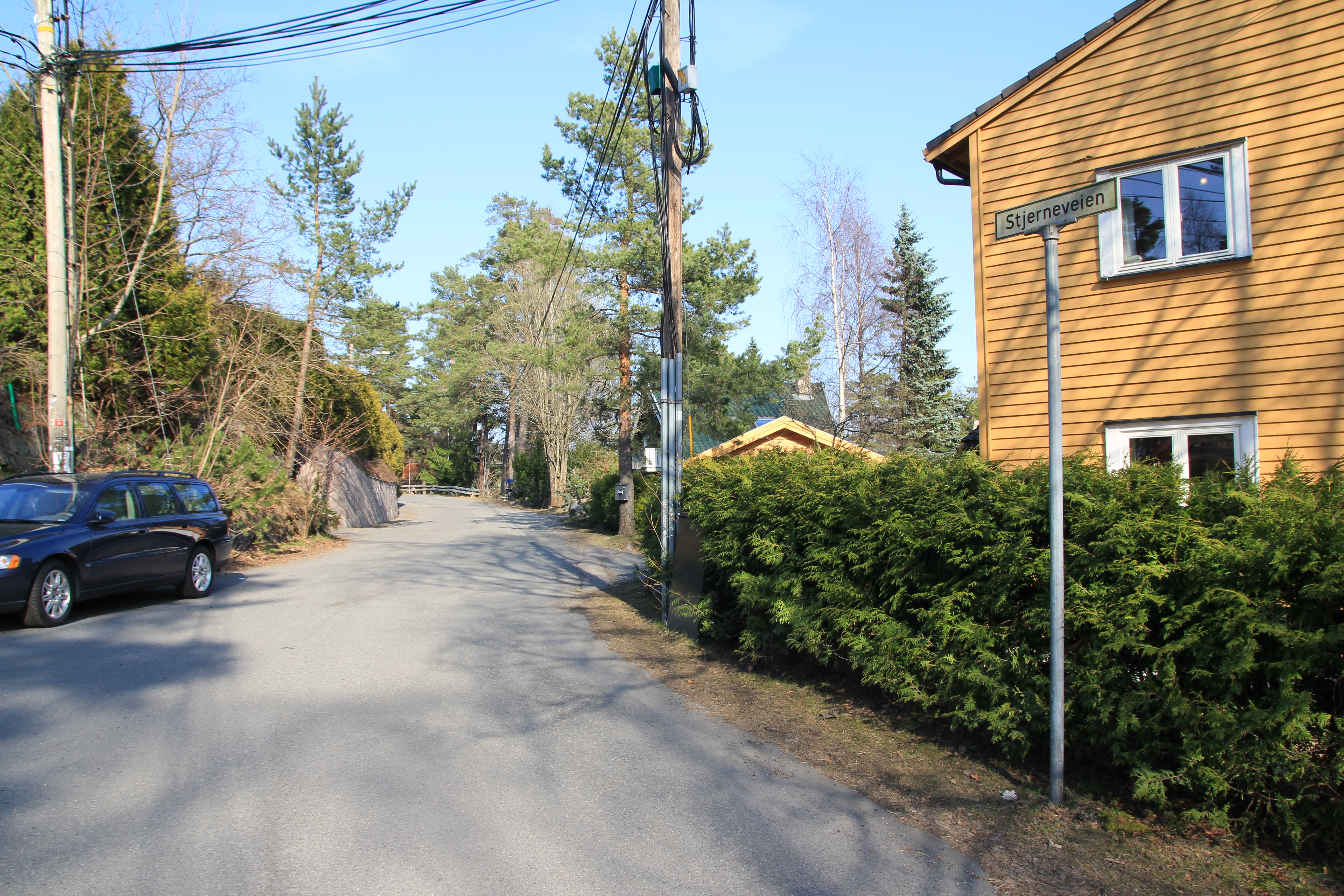 Stjerneveien, Oslo